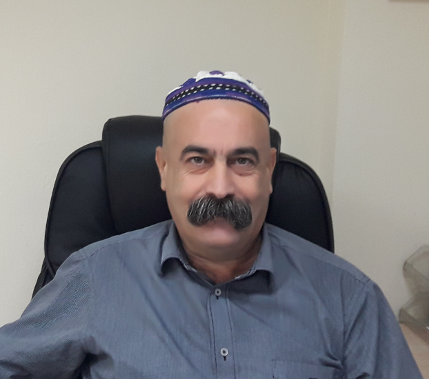 שייח' מוהנא פארס, איש חינוך, איש דת ואינטלקטואל